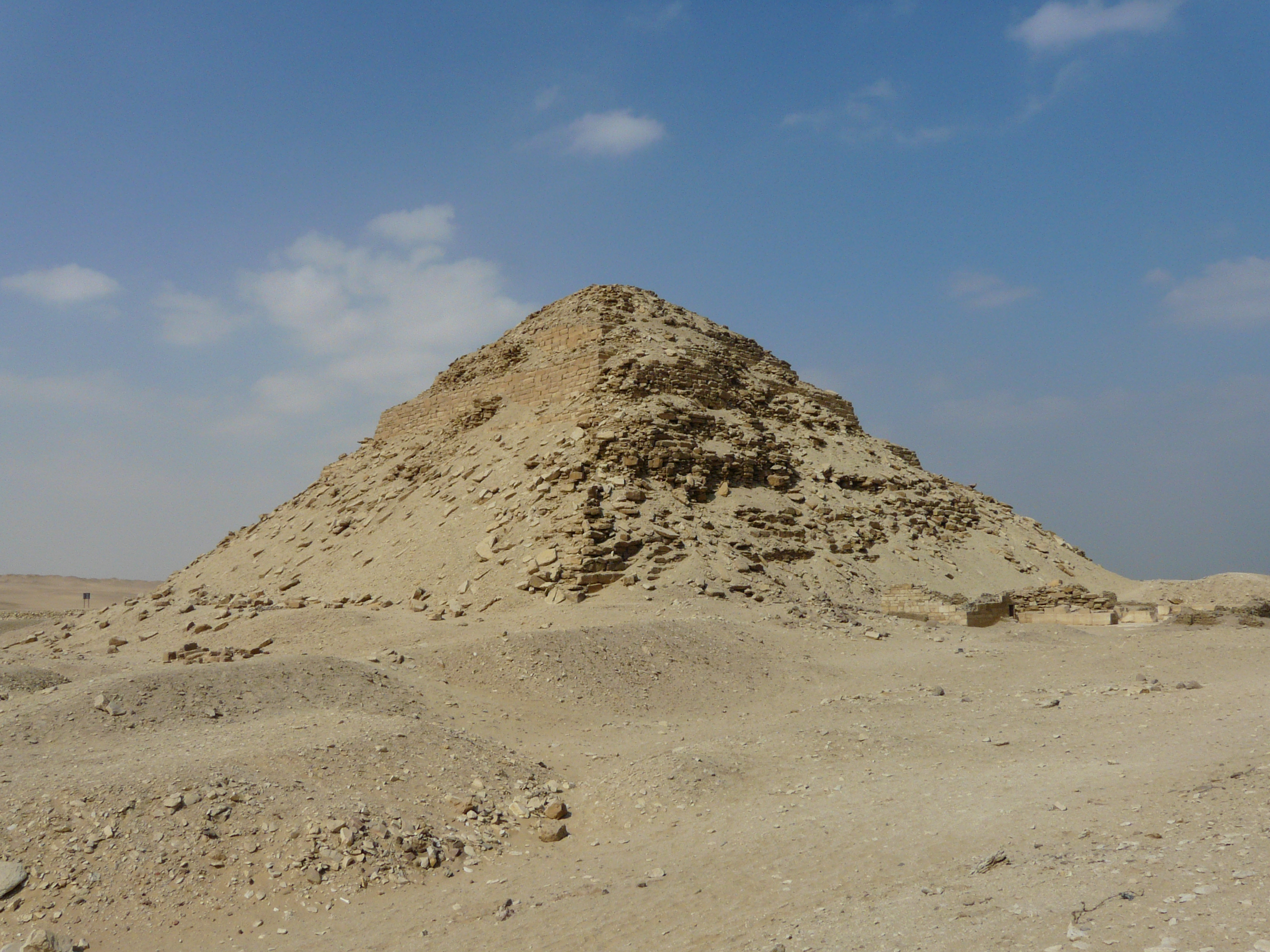 Pyramide de Néferirkarê (Ve dynastie) - Abousir